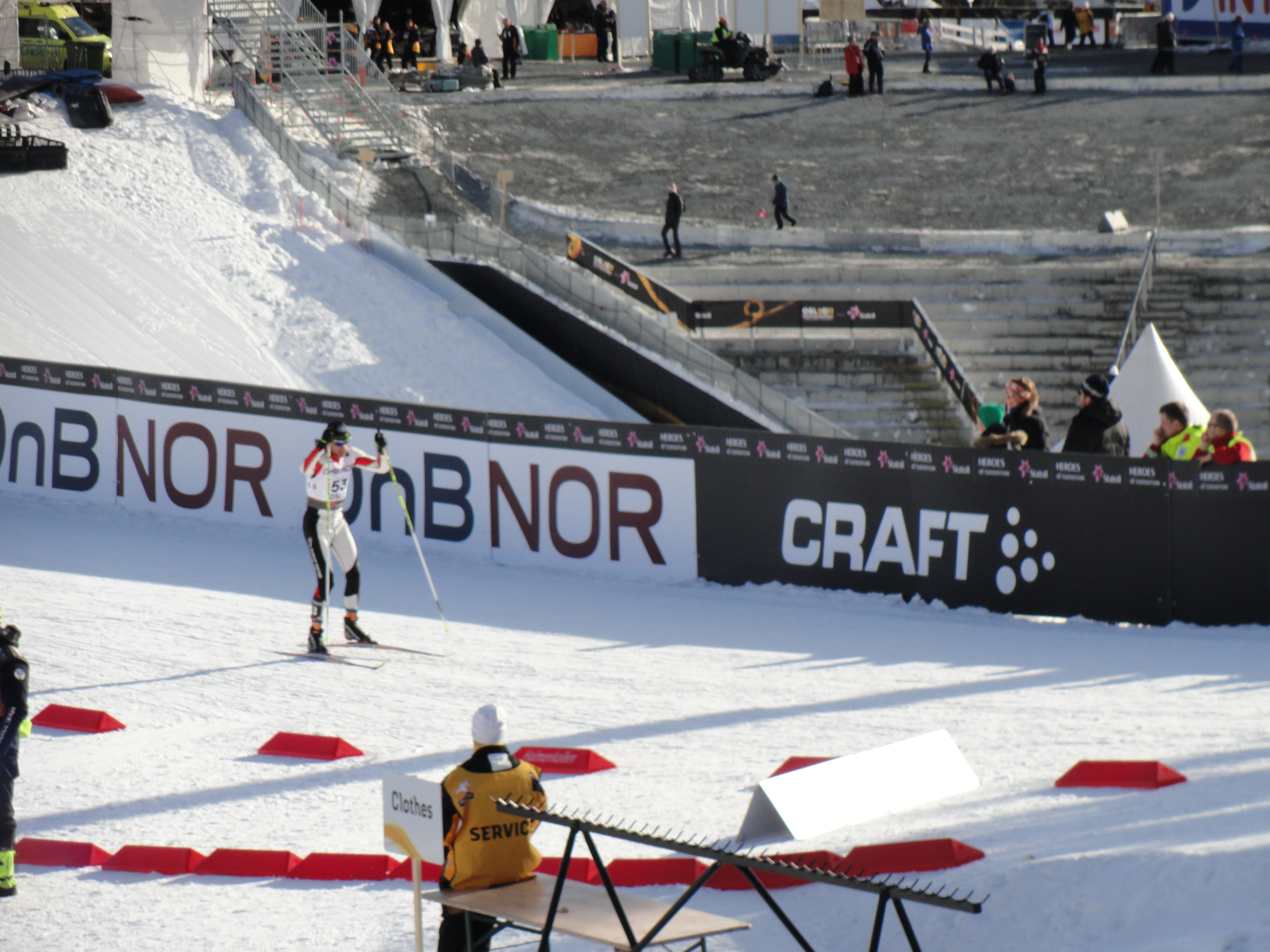 Bilde av Gutiérrez på 50 kilometer fristil i Holmenkollen 2011.